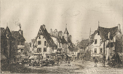 A Cusset (Excursion de Vichy), eaux-forte